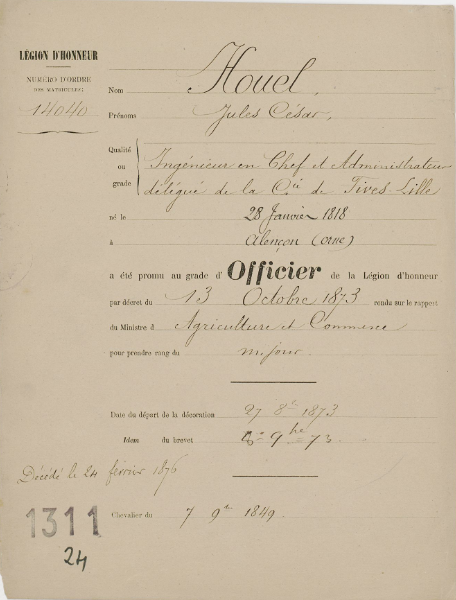 Legion d'Honneur